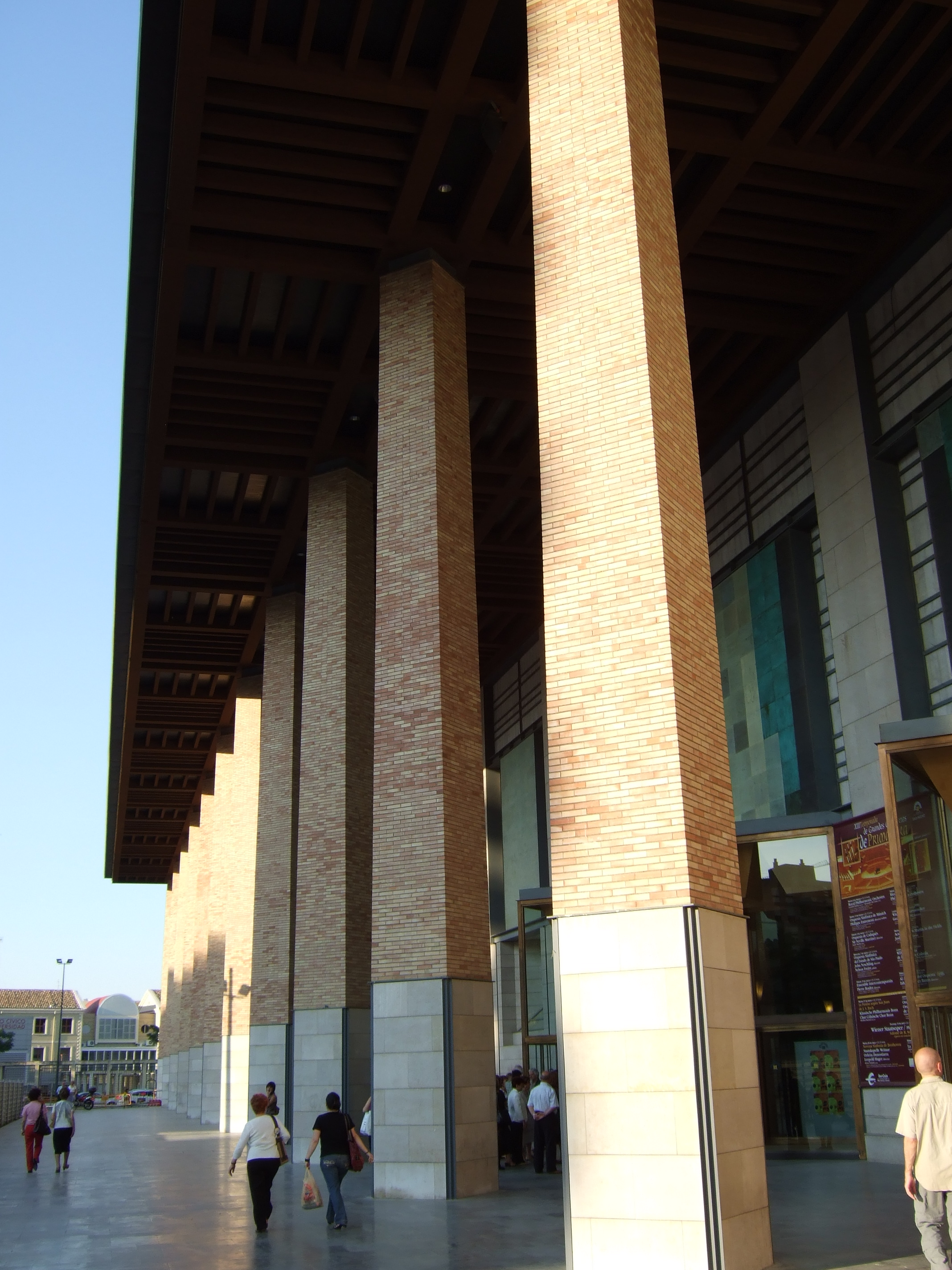 Template:Auditorio de Zaragoza